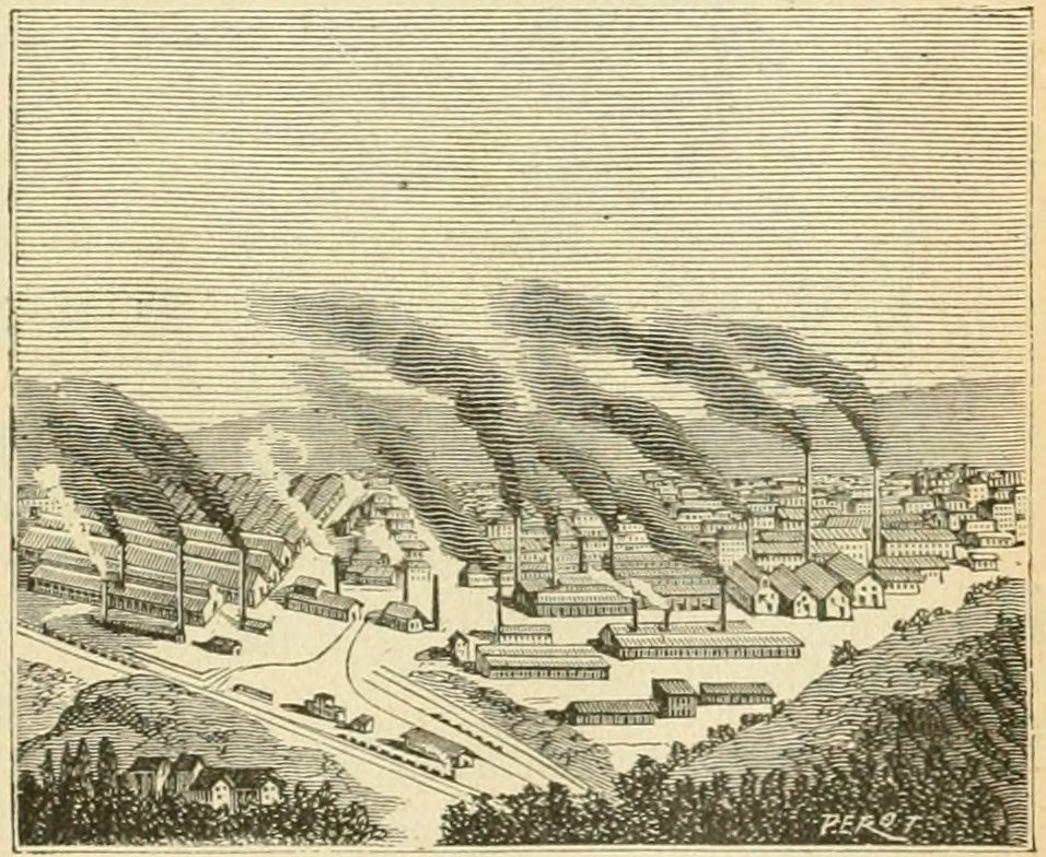 Le tour de la France par deux enfants, par George Bruno, manuel scolaire, édition de 1904.